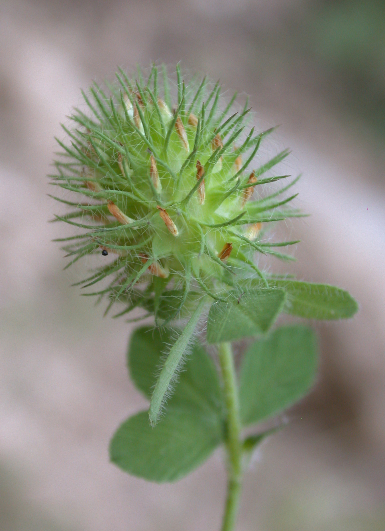 Trifolium lappaceum L. (תלתן קיפודני), Mount Carmel, Israel, April 23, 2008.